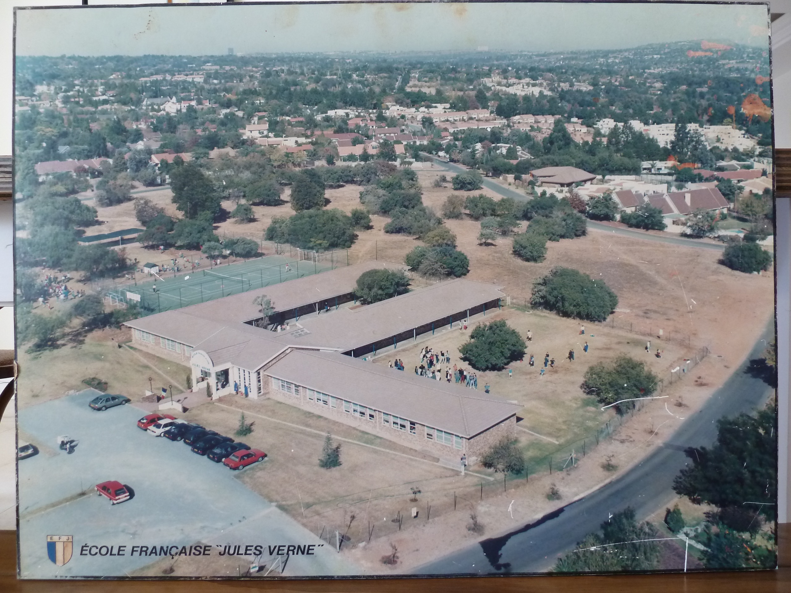 Le lycée Jules Verne en 1992. Cette photo m'a été donner après un échange et l'accord de la direction du Lycée Jules Verne.